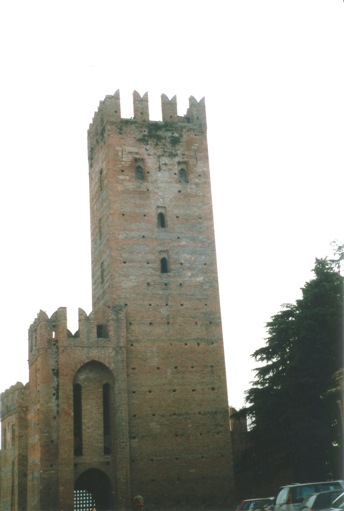 Autore Giorces.